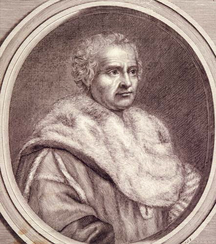 Portrait de Michel Riccio (ou Rys) premier président du parlement d'Aix-en-Provence